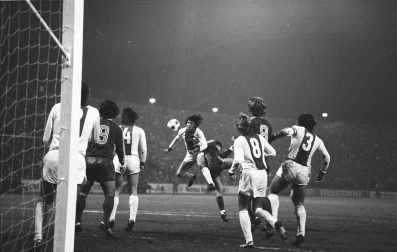 Fußball-Europapokalspiel, Magdeburg - München ADN-ZB/Kluge/6/11/74/Magdeburg: Fußball-Europapokal der Landesmeister/ 1. FC Magdeburg - FC Bayern München 1:2/ Konterangriff des FC Bayern München beim Europapokal-Rückspiel am 6.11.74. Der Magdeburger Seguin bringt den Ball mit einem Kopfstoß vor Kapellmann (München) aus dem Strafraum seiner Elf. Müller (9/München) wird von Abrahm (4/Magdeburg) gedeckt. Raugust (8) und Zapf (3) hindern den Münchner Zobel (halb verd. 8) am Eingreifen.